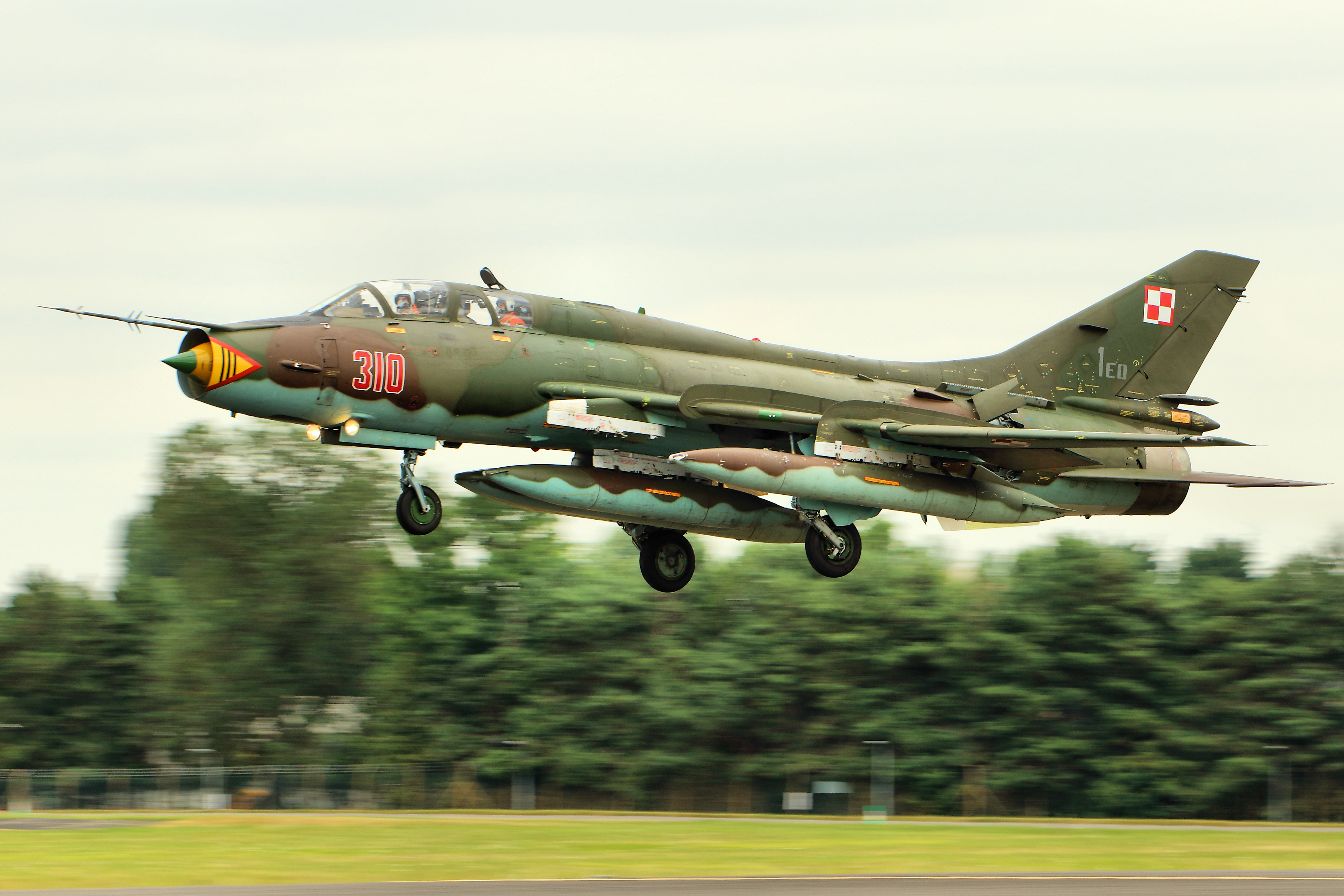 SU-22M-3K - RIAT 2015